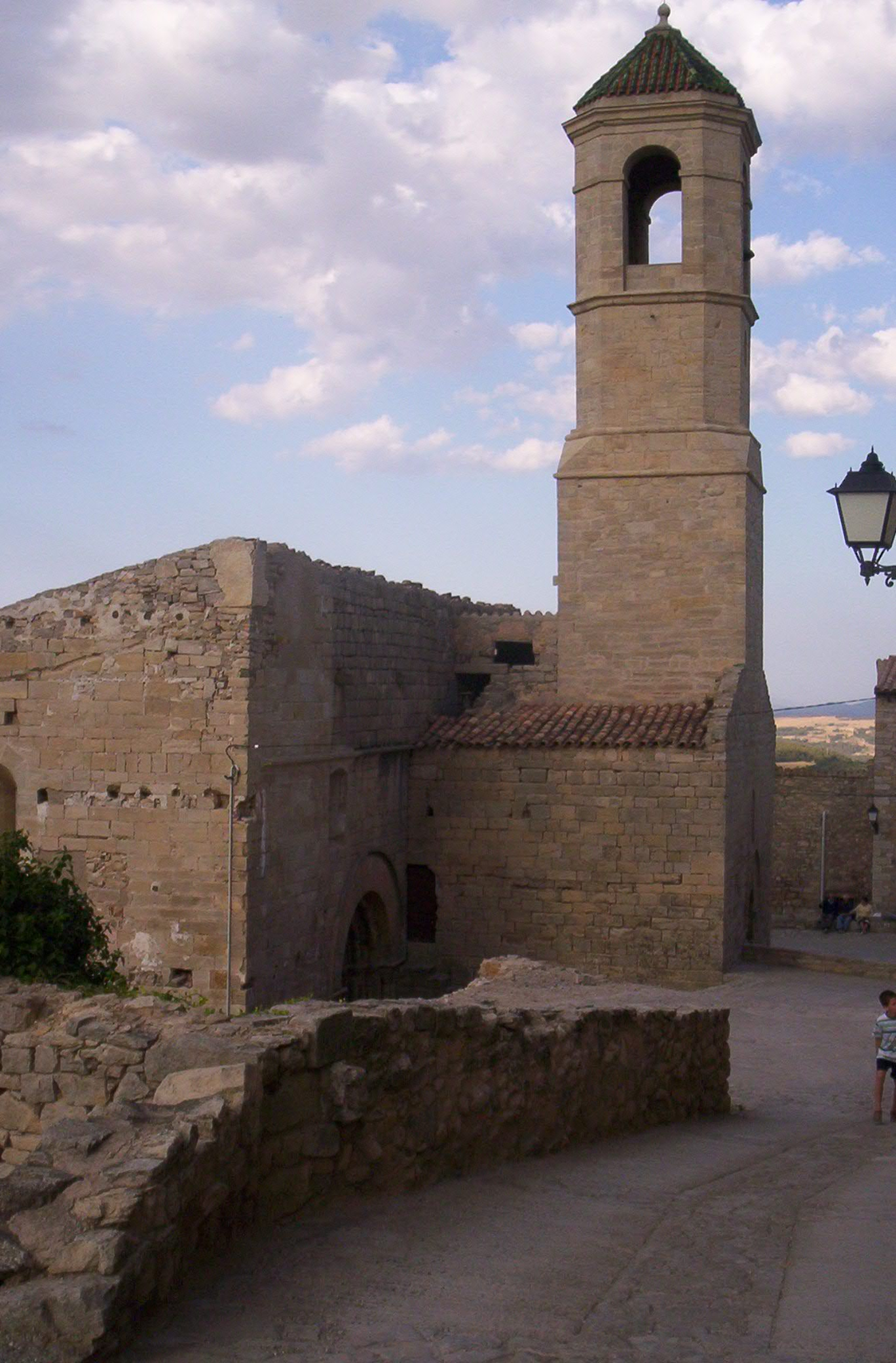 Campanar de l'església de Forès